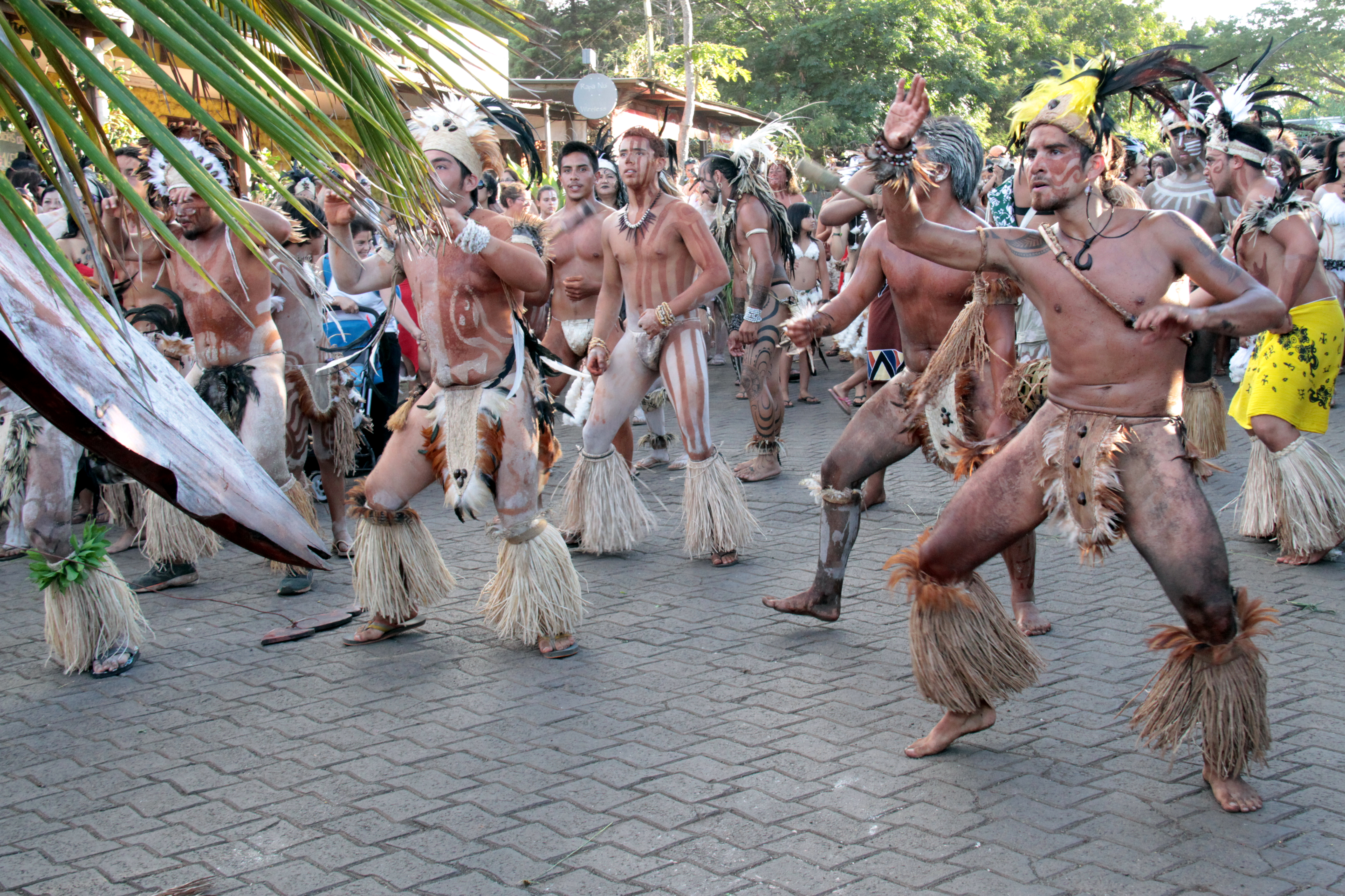 festival tapati sur l'ile de paques